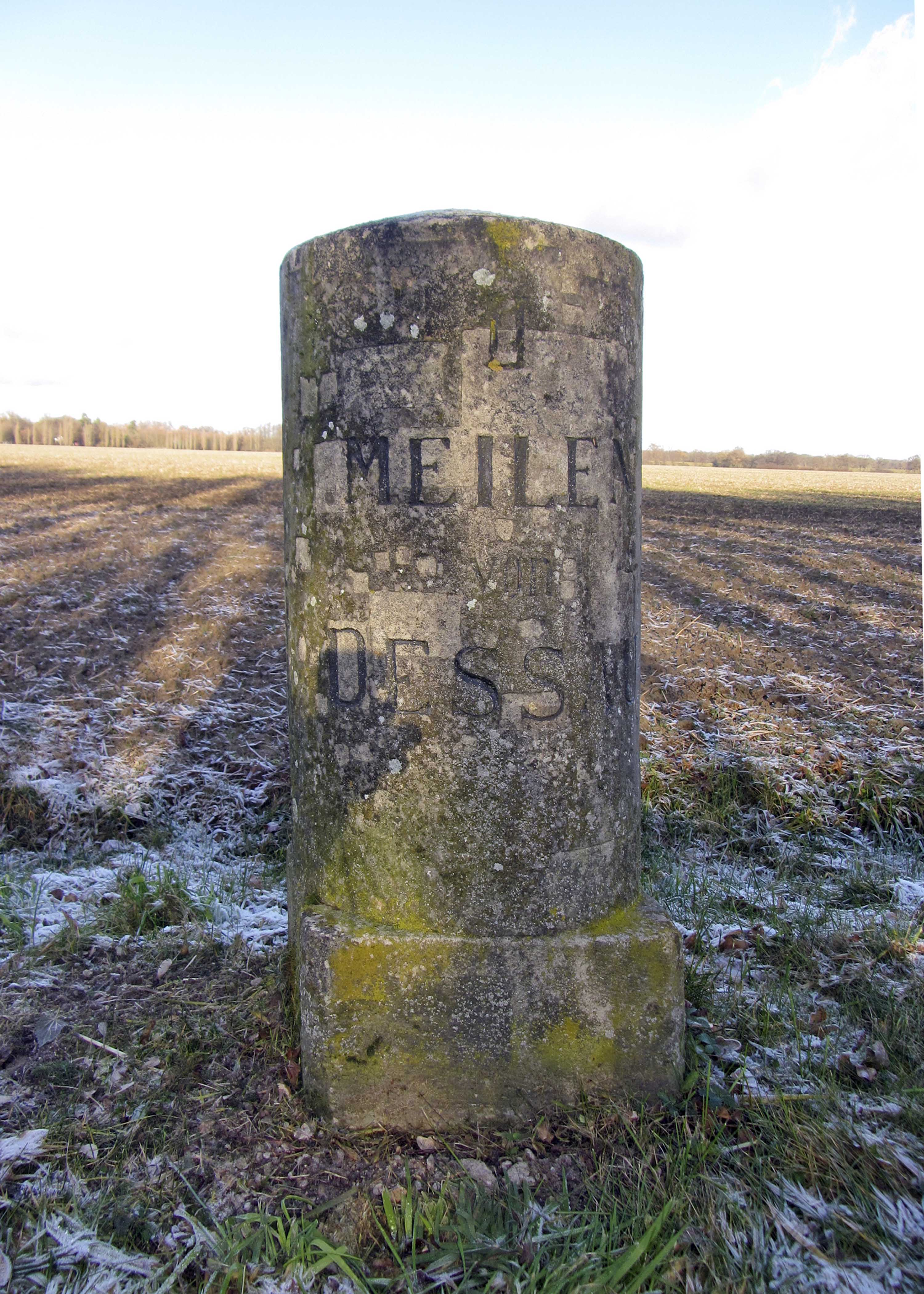 Anhaltischer Meilenstein (0741) an der K 2042 zwischen Riesigk und Wörlitz.